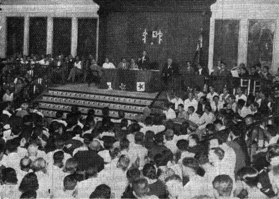 14-a kongreso de Sennacieca Asocio Tutmonda en Valencio. Solena malfermo; parolado de k-do Luis Hernández Lahuerta.